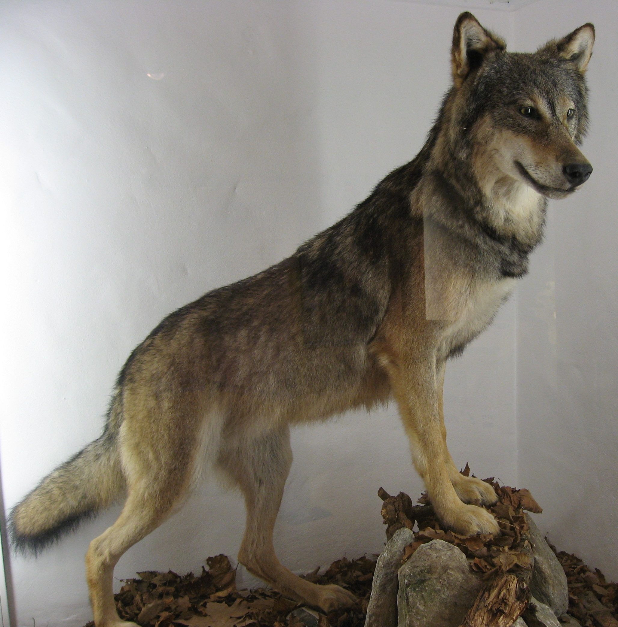 Stuffed Canis lupus in Chamonix (Loup empaillé)